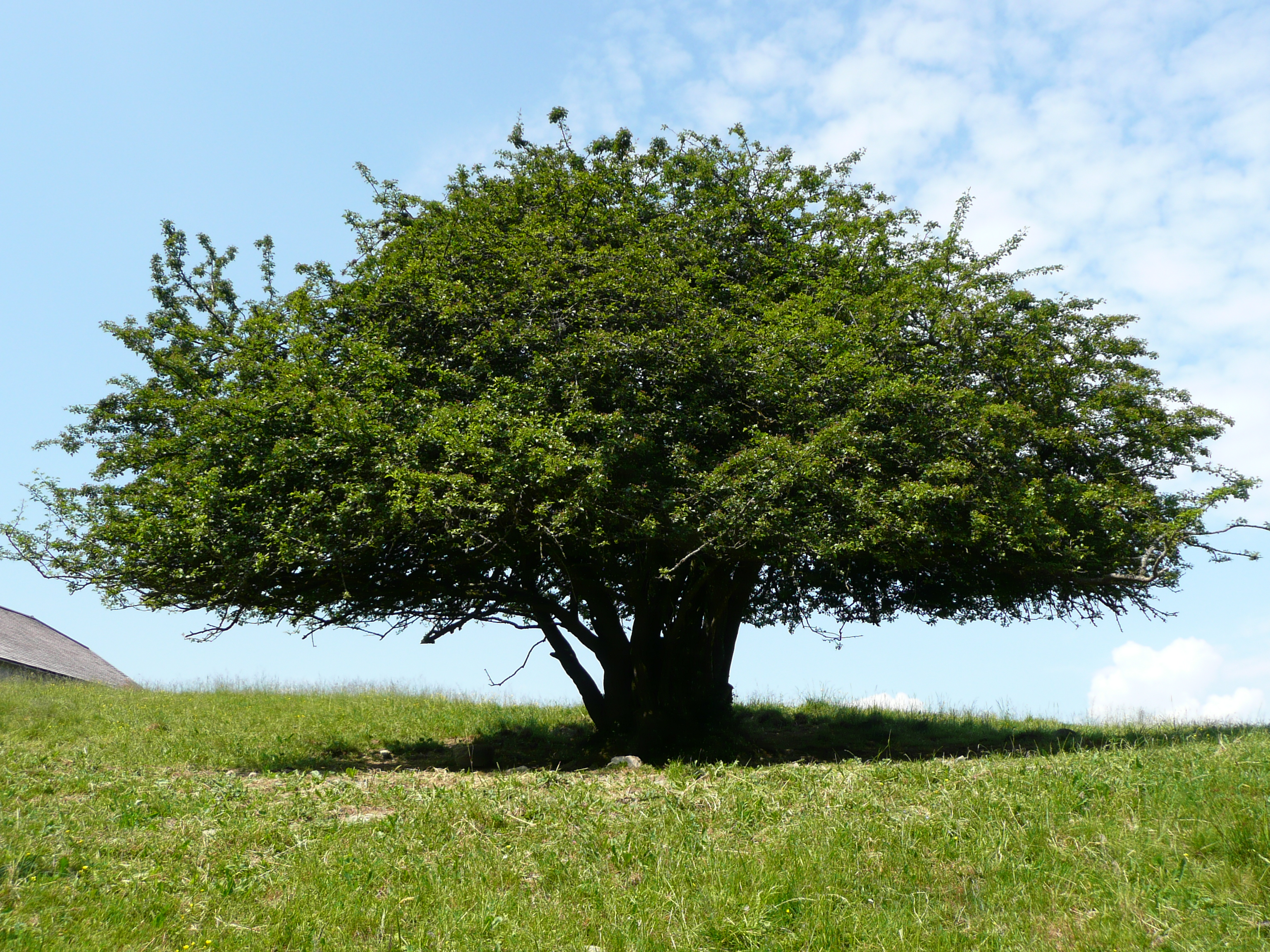 Weißdornstrauch Alpe Schuttannen This media shows the natural monument in Vorarlberg with the ID 12.